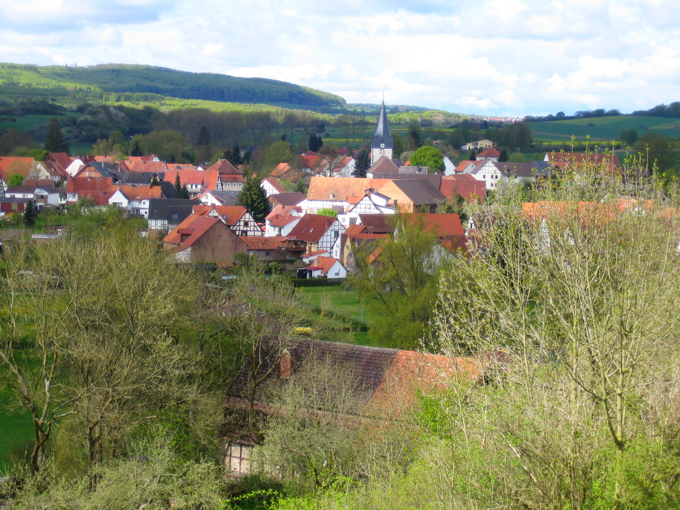 Niedermeiser vom Foessenberg